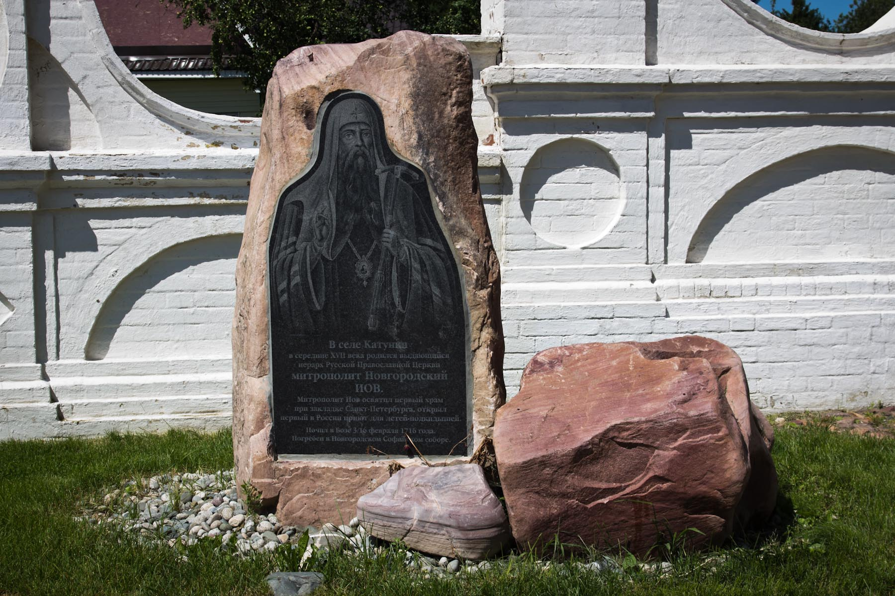 Камень (2012.07.03)